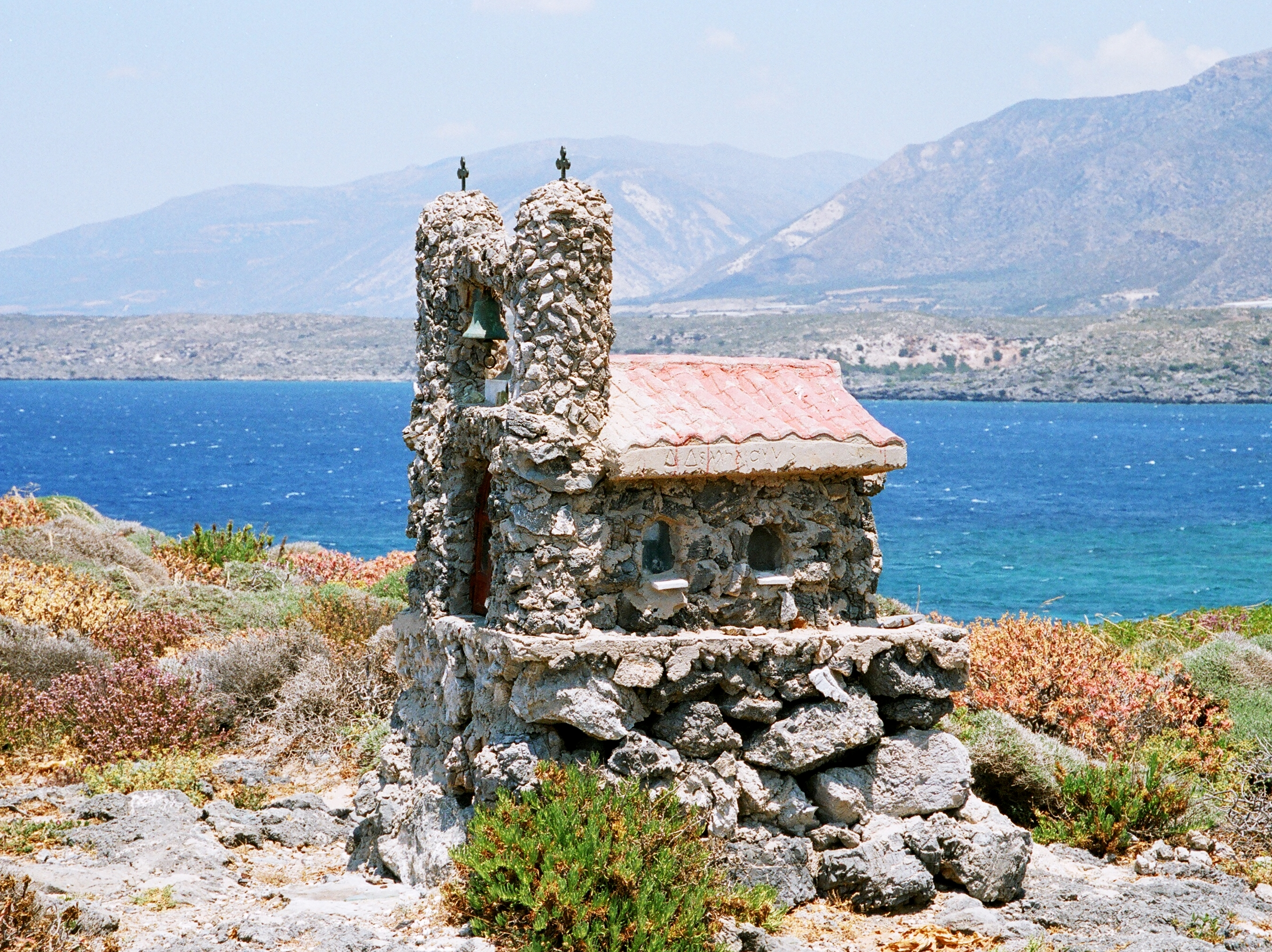 Insel Elafonisi, Denkmal am Westkap, Kreta (Griechenland)